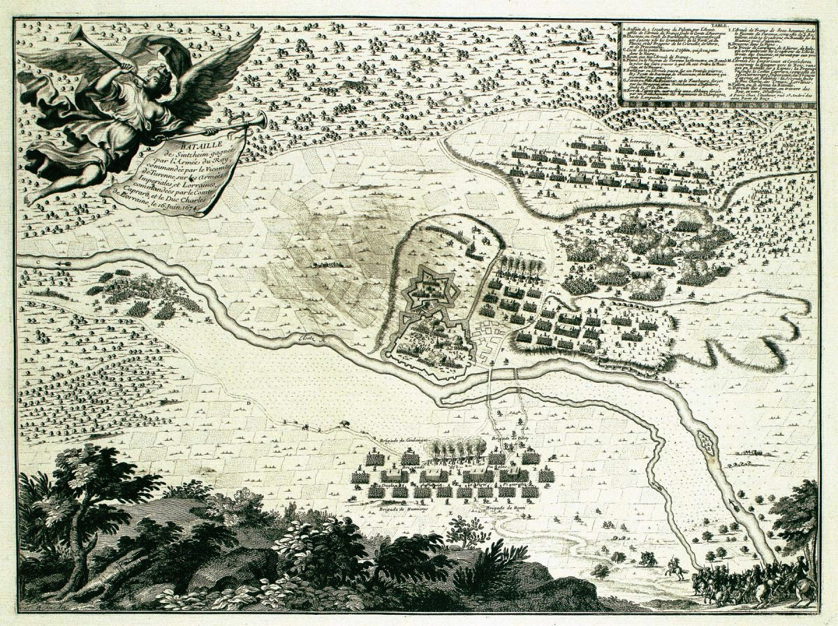 Kupferstich der Schlacht bei Sinsheim (1674). Originalbeschreibung: "Bataille de Sintzheim gagnée par l'armée du Roy commandé par le Vicomte de Turenne sur les Armées Imperiales et Lorraines, commandées par le Comte de Caprara et le Duc Charles de Lorraine, le 16. Juin 1674"